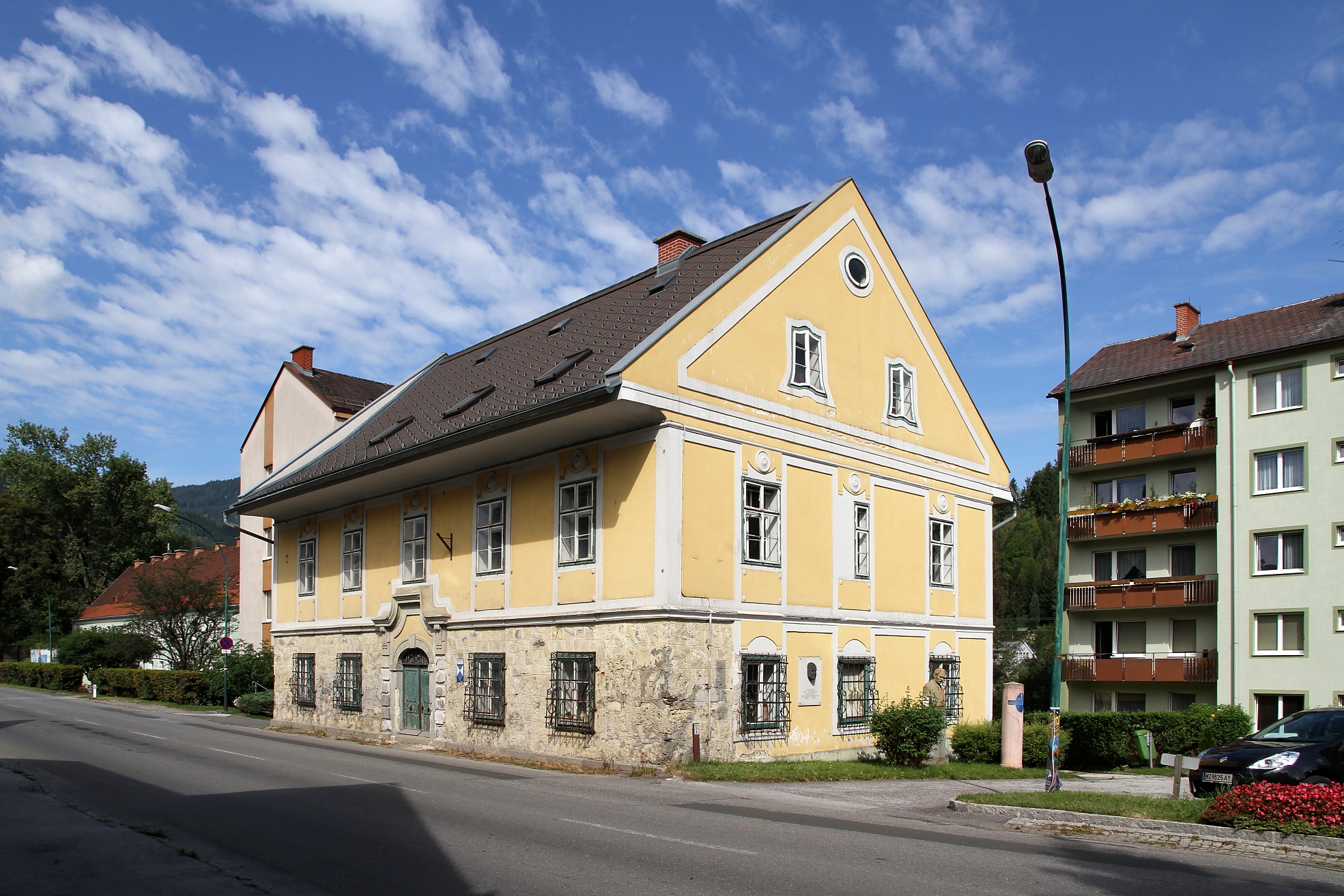 Das ehemalige Forstamt in Mürzzuschlag. Es diente lange als Wintersportmuseum und stammt aus dem Ende des 18. Jahrhunderts mit Plattenstil, Satteldach und Fensterkörben.